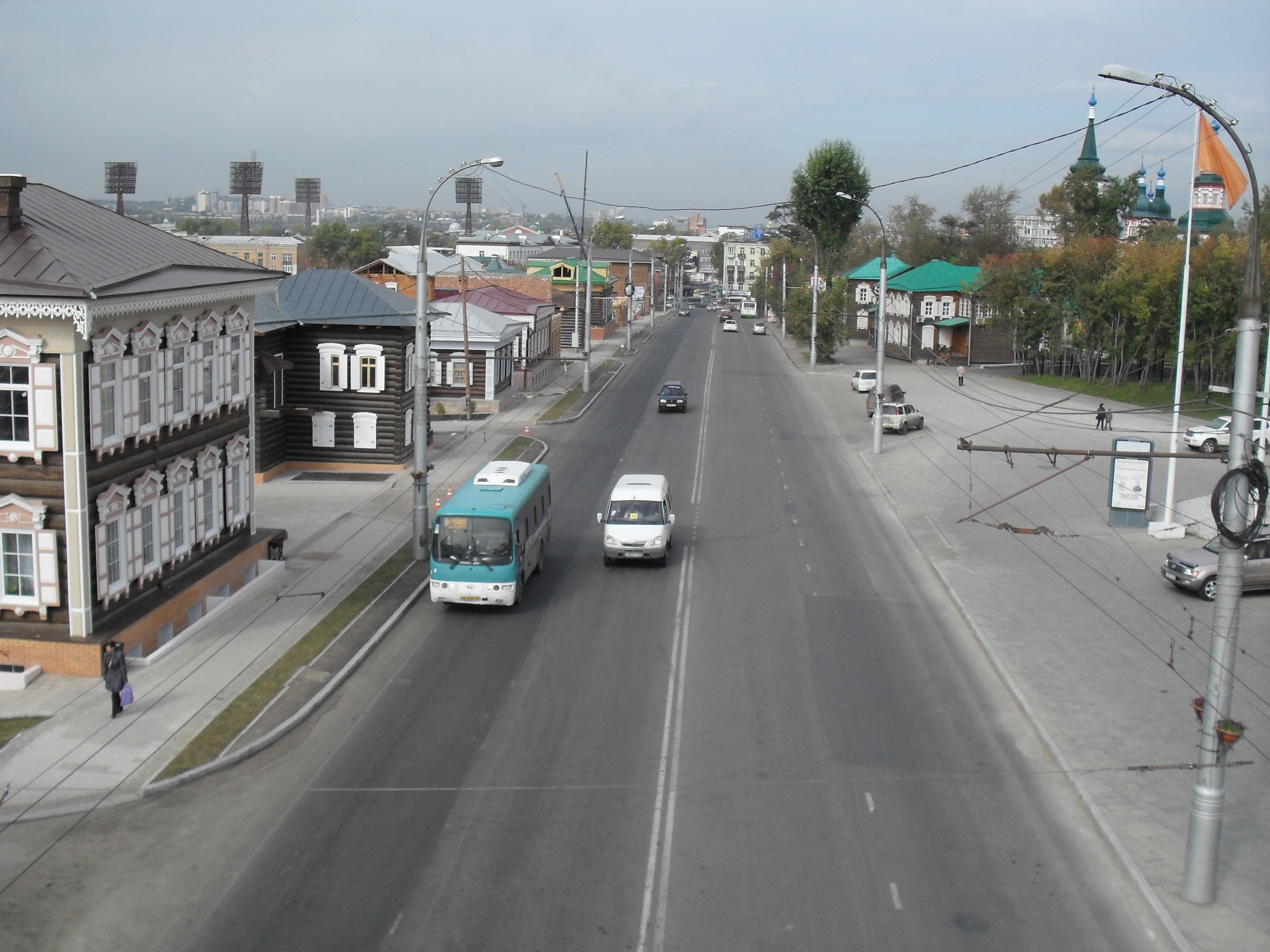 Иркутск. Иркутск. Улица Седова